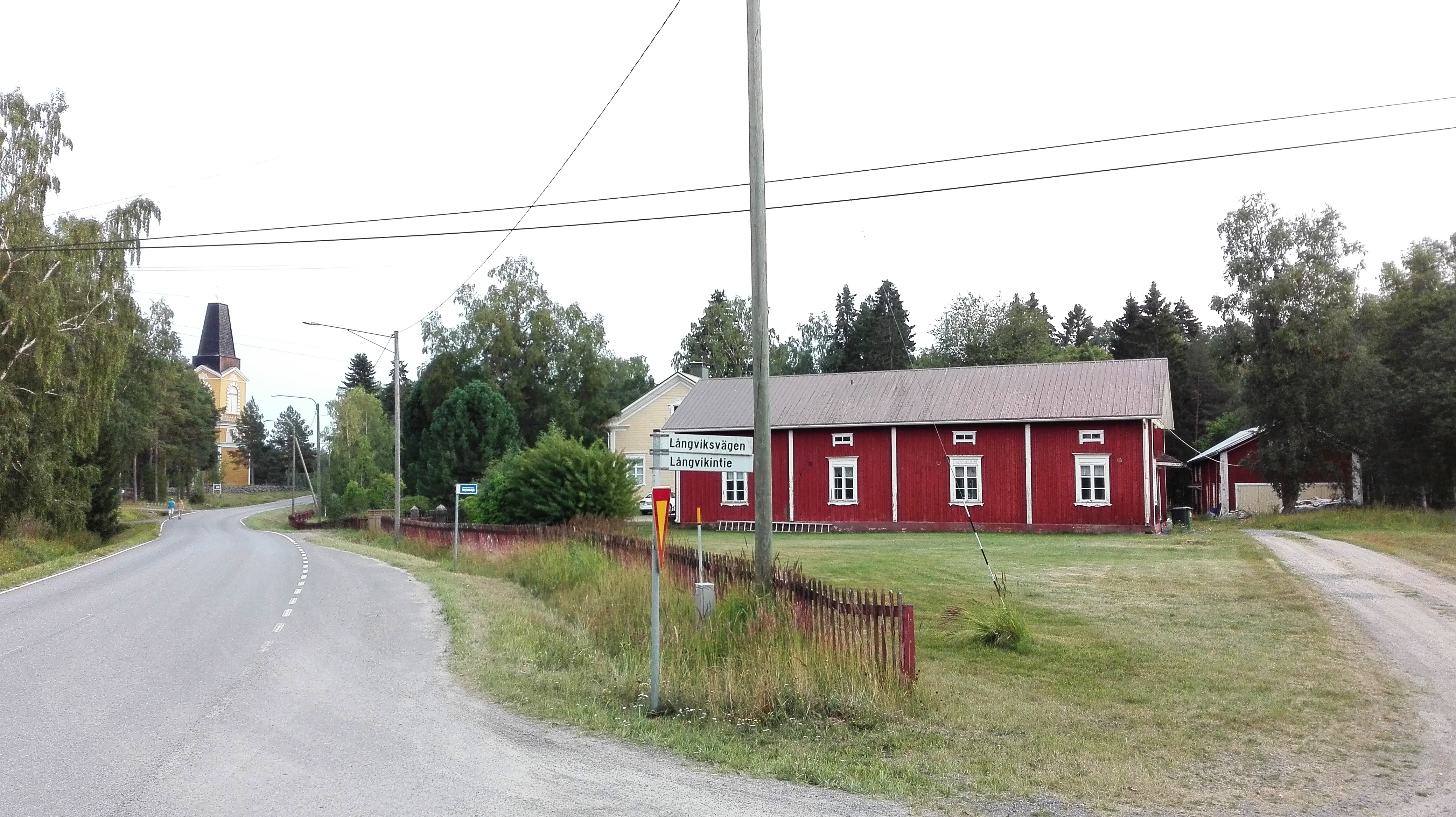 I kyrkbyn i Sideby finns det gamla kommuncentret, med kyrka och klockstapel, prästgård (såld av församlingen), före detta kommunhus från den tid Sideby socken var en egen kommun.